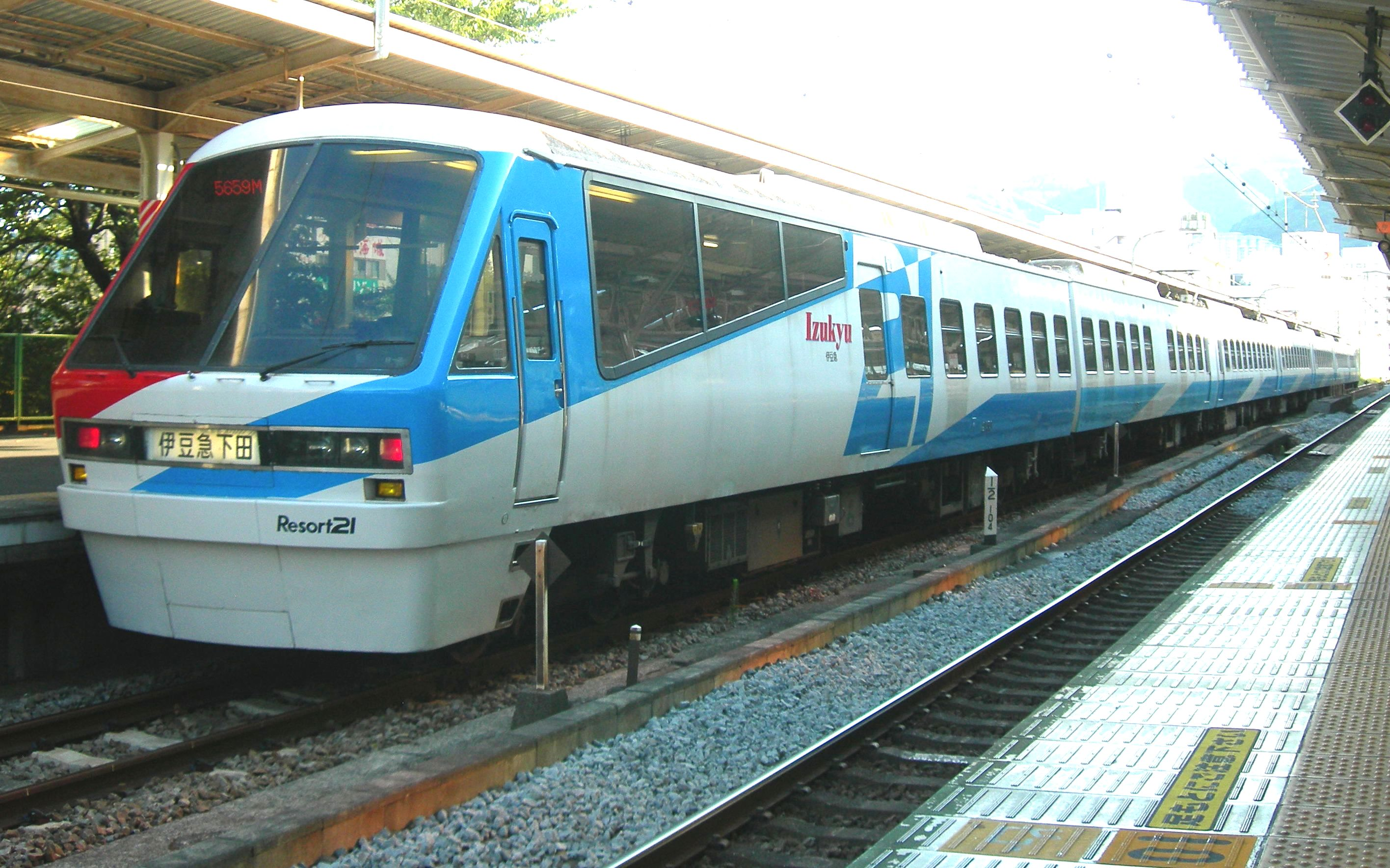 リゾート21